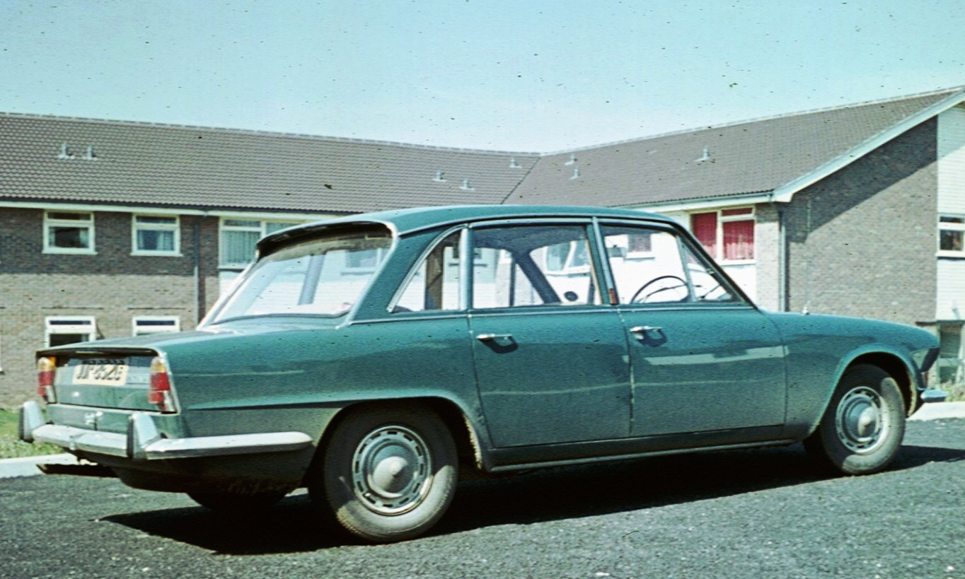 Triumph 2000 pre facelift